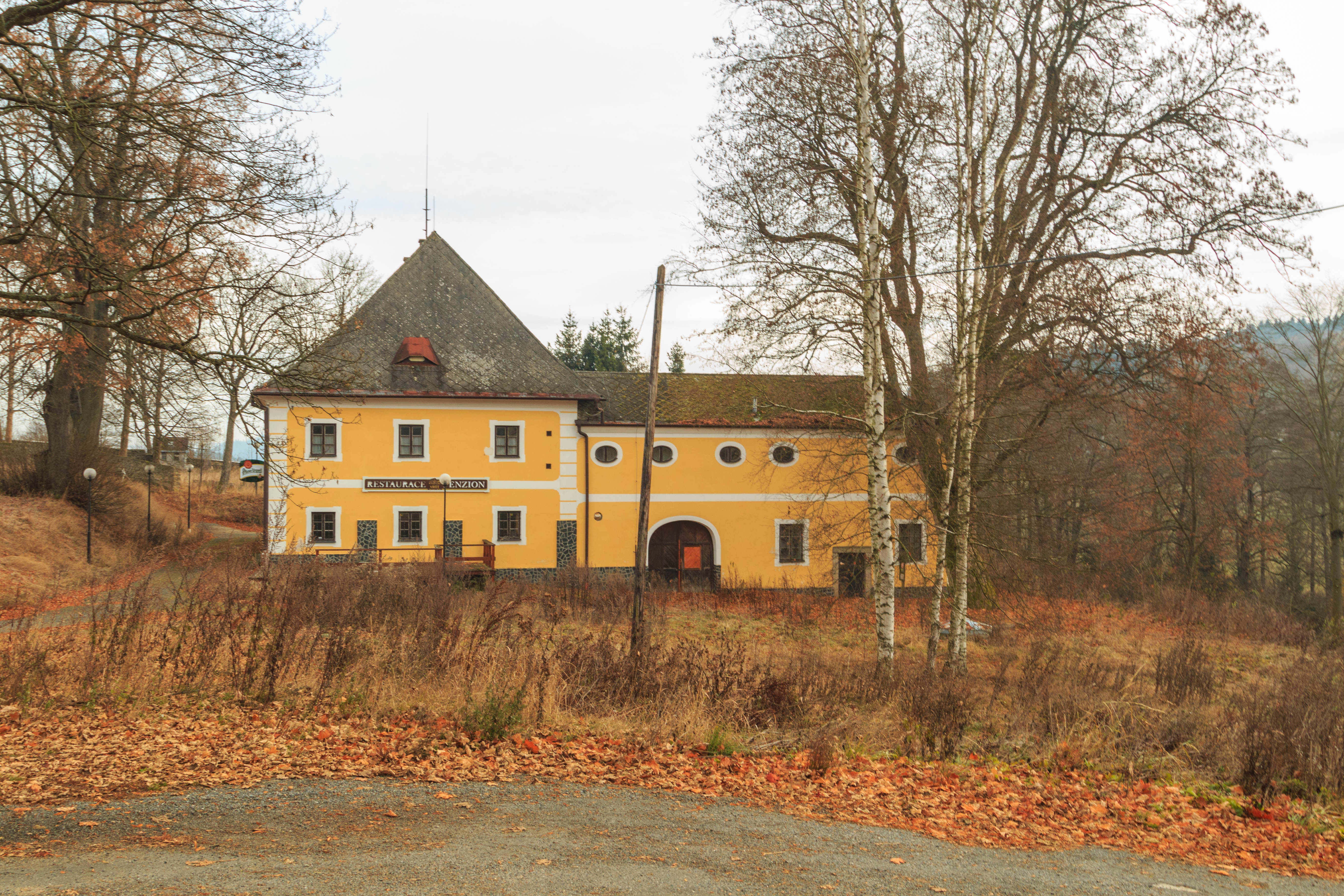 Tvrz, Vříšť 1, Vříšť.